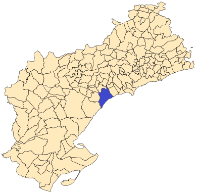 Situación de Mont-roig del Camp en la provincia de Tarragona.